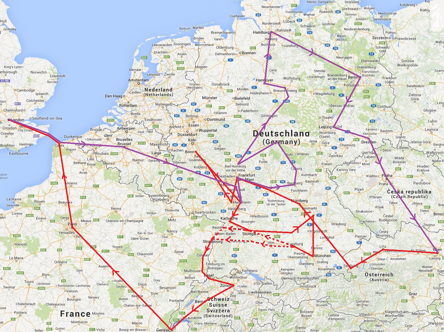 Reiseplan der blinden Komponistin, Pianistin, Sängerin und Musikpädagogin Maria Theresia Paradis (1759-1824) kreuz und quer durch Europa auf Grundlage der Beschreibungen von Marion Fürst in: "Maria Theresia Paradis. Mozarts berühmte Zeitgenossin". Böhlau 2005.